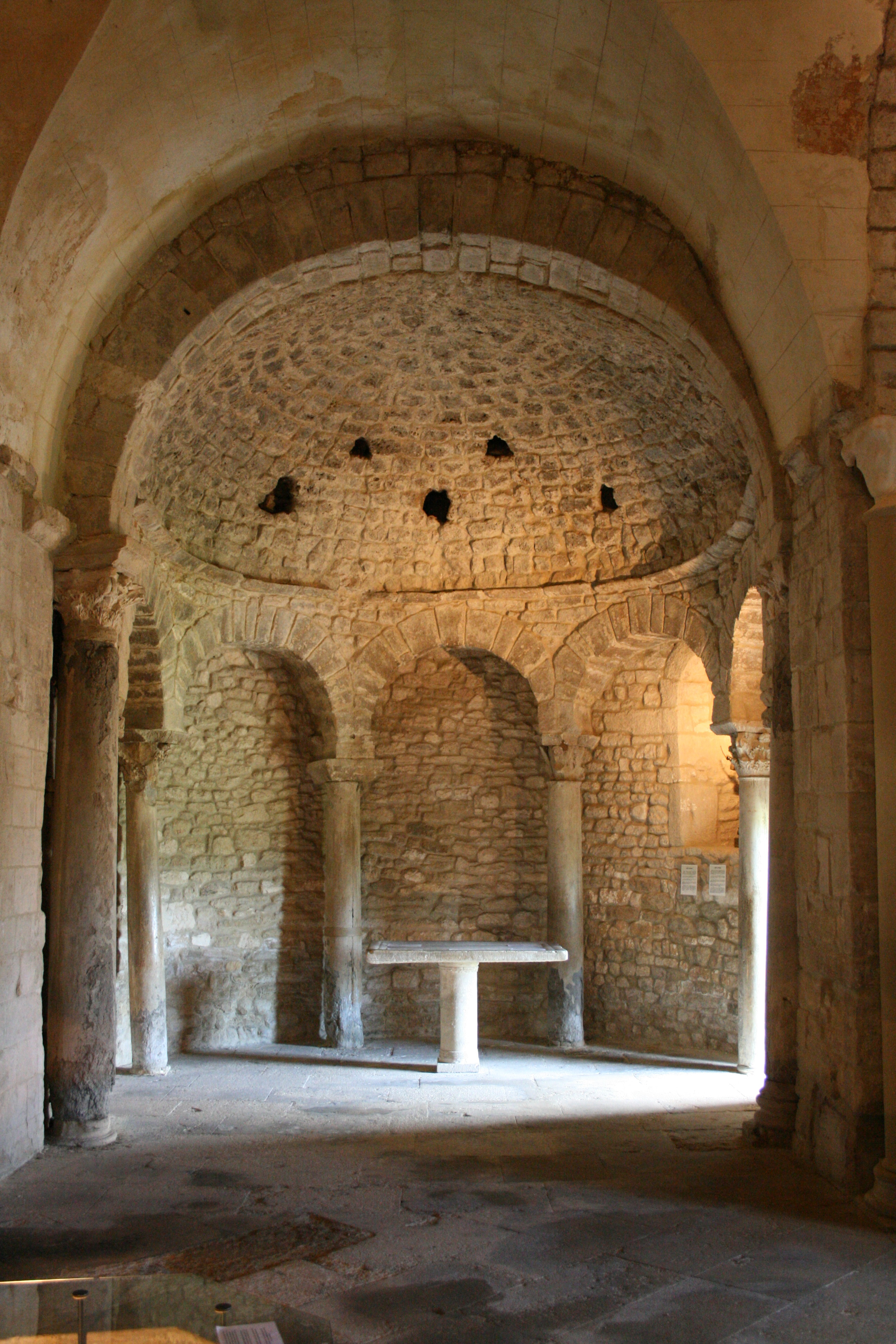 Baptistère de Venasque, département du Vaucluse (France). Une des absides en cul de four de l'édifice cruciforme